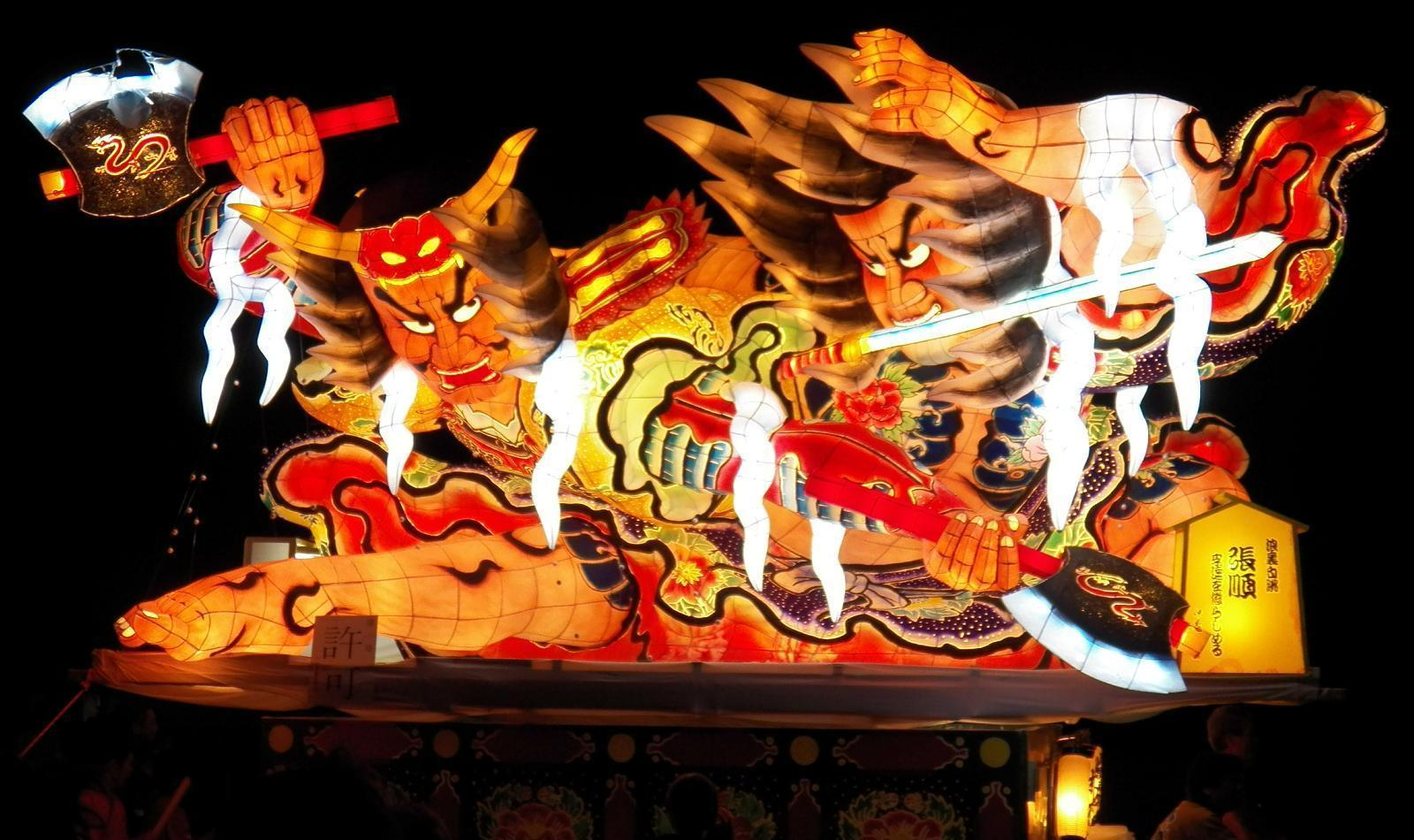 つがる市木造のねぶた（2013年）